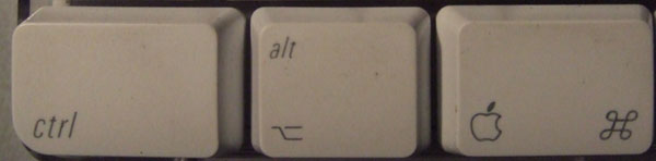 Touches spéciales sur un clavier Mac Apple